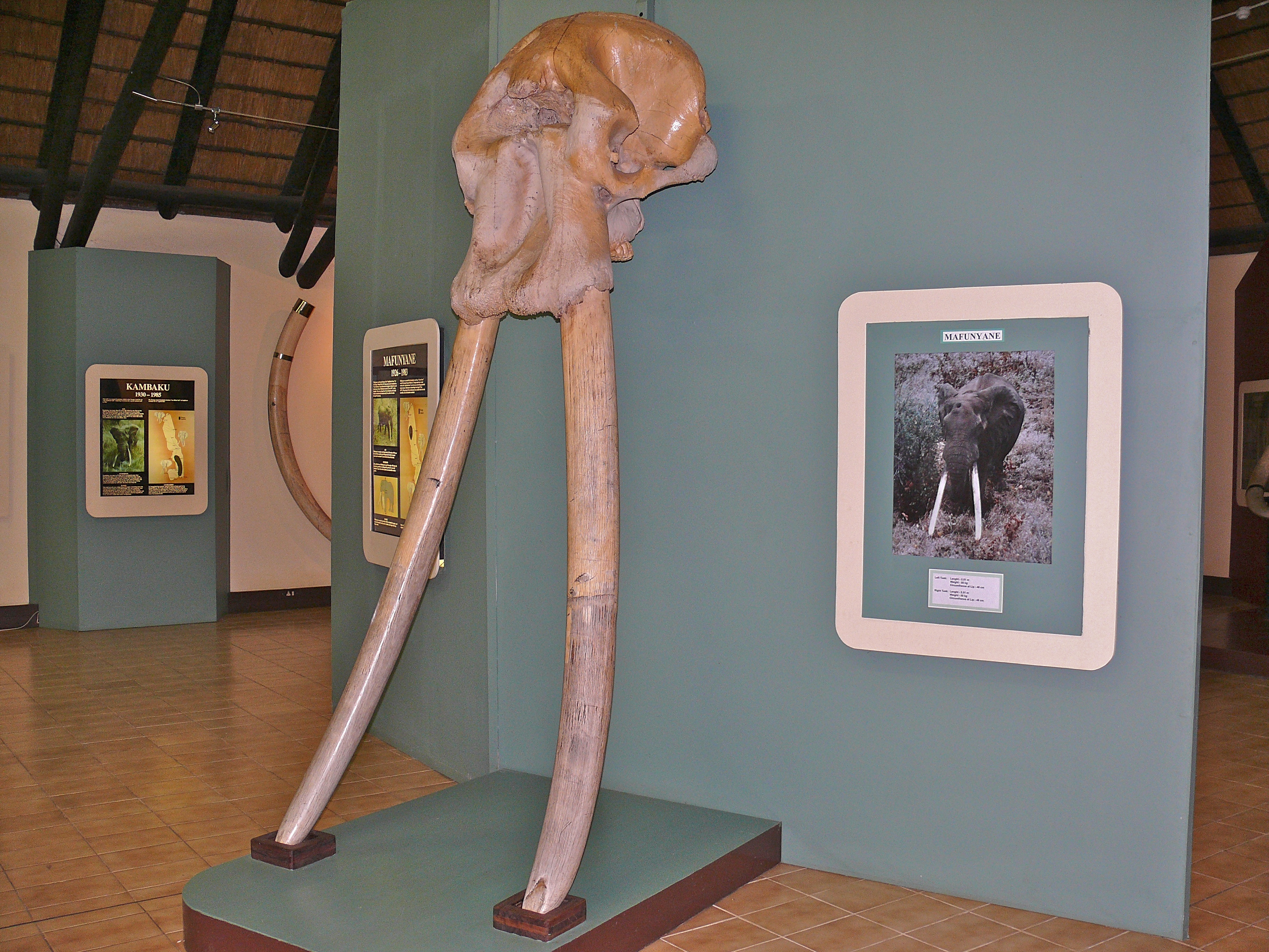 Letaba Camp, Kruger NP, SOUTH AFRICA